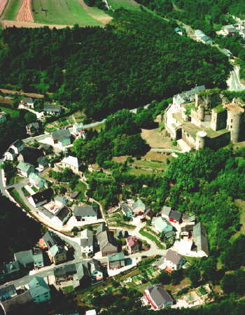 Luftbild der Ortslage Reichenberg im Rhein-Lahn-Kreis